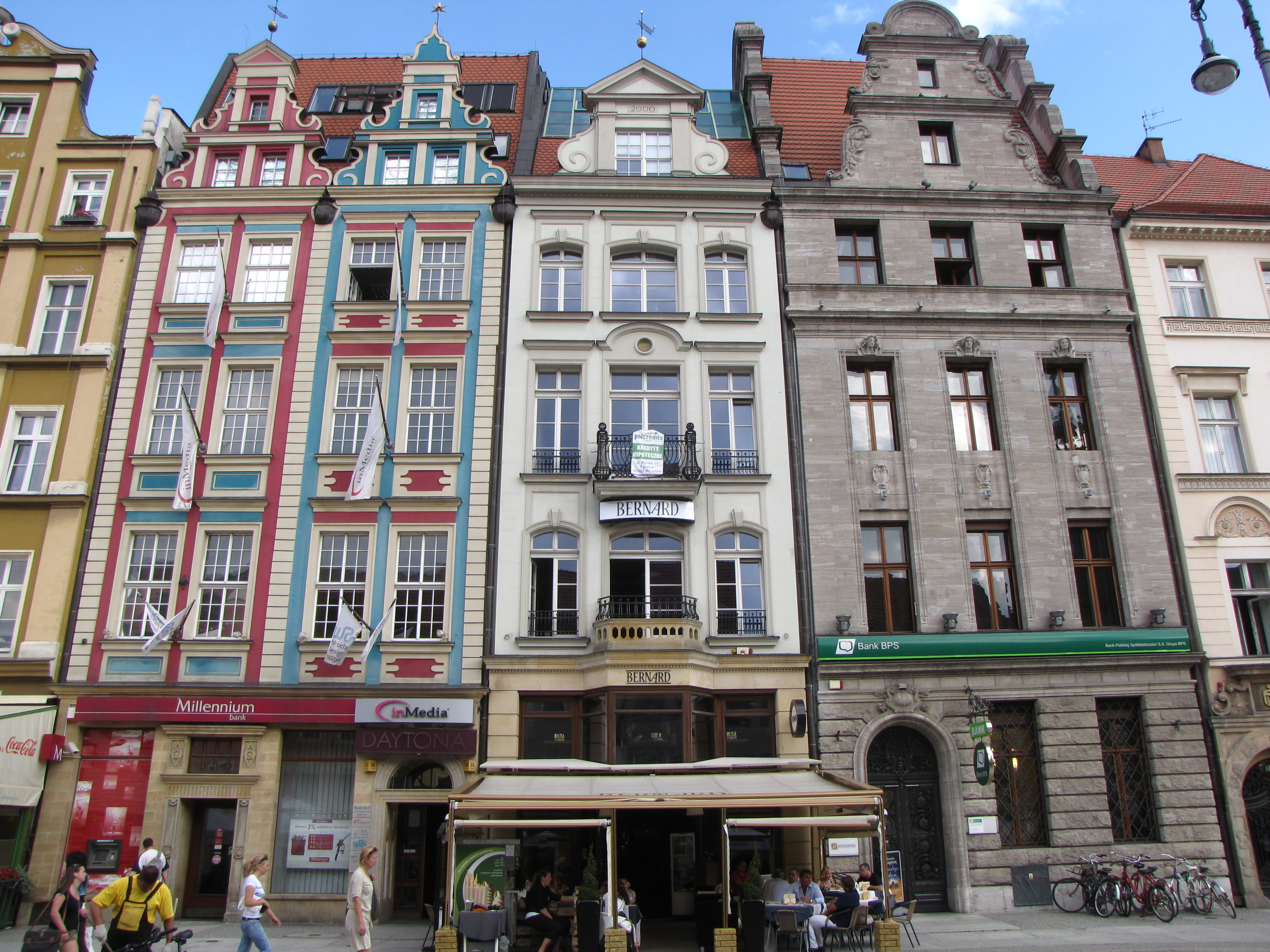 Leszno - Rynek